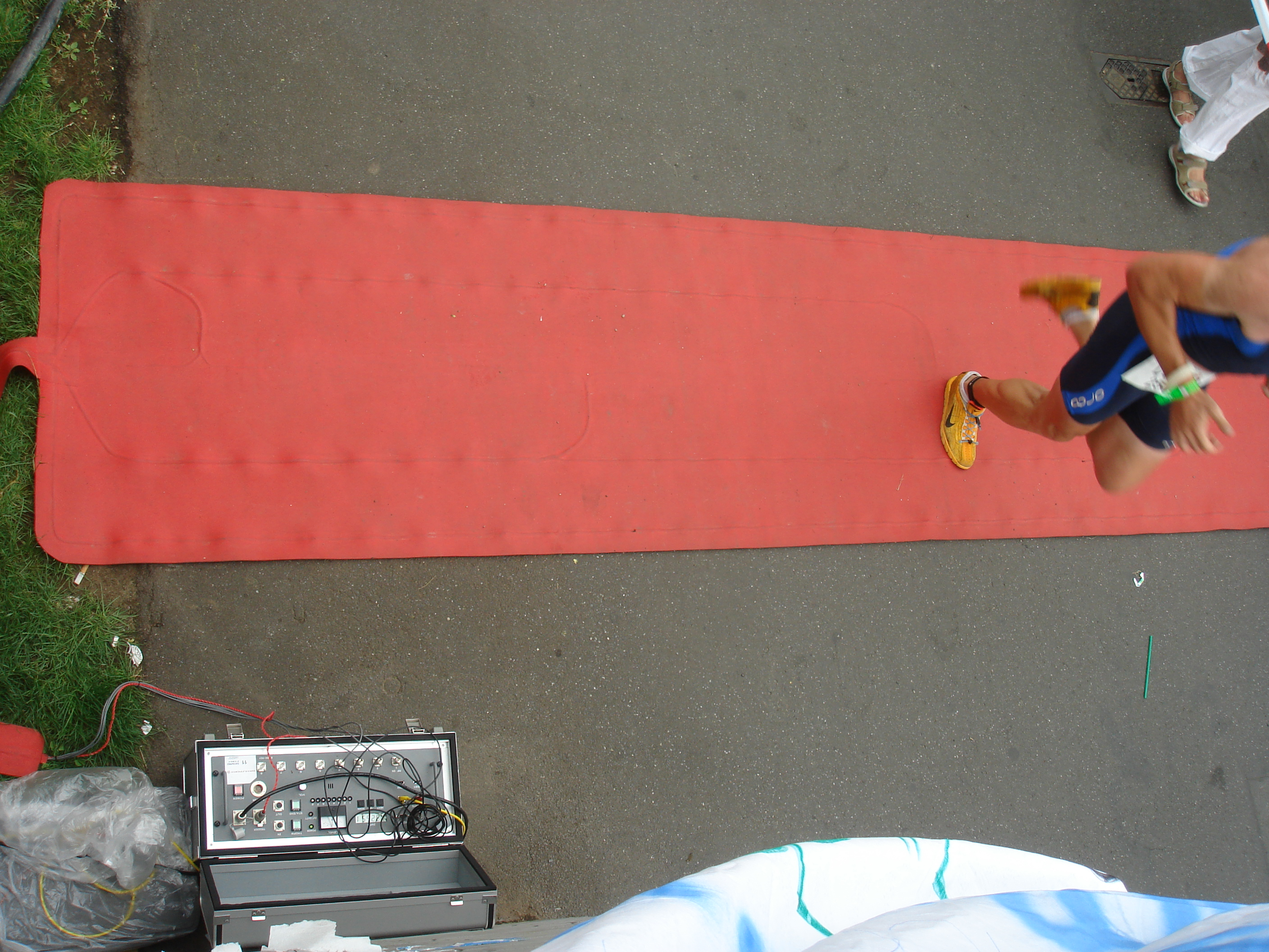 Zeitnahme beim Marathon des Ironman Germany 2007 in Frankfurt, das schwarz-rote Band am Knöchel des Läufers enthält den Transponder, die rote Matte empfängt das Signal (ähnlich Champion Chip).